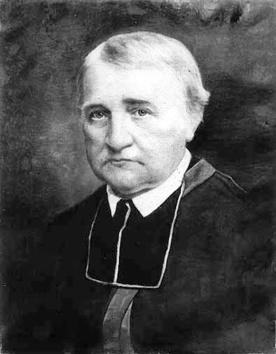 Geschilderd portret van Paulus Dominicus van Laer (1805-1883). Geboren te Heythuisen, 18-10-1805, tot priester gewijd in Luik, 18-12-1830, kapelaan te Cortessen, 1830-1832, kapelaan te Hasselt, 1832-1834, docent te Weert, 1834-1835, directeur van de Normaalschool te Rolduc, 1835-1849, pastoor-deken van Wyck ,1853-1883, kanunnik van het kathedraal kapittel in Roermond,1870-1883, ere-kamerheer van Paus Pius IX. Overleden te Maastricht, 25-01-1883. Fotocollectie RHCL Maastricht, GAM 18502. De verblijfplaats van het portret is onbekend.